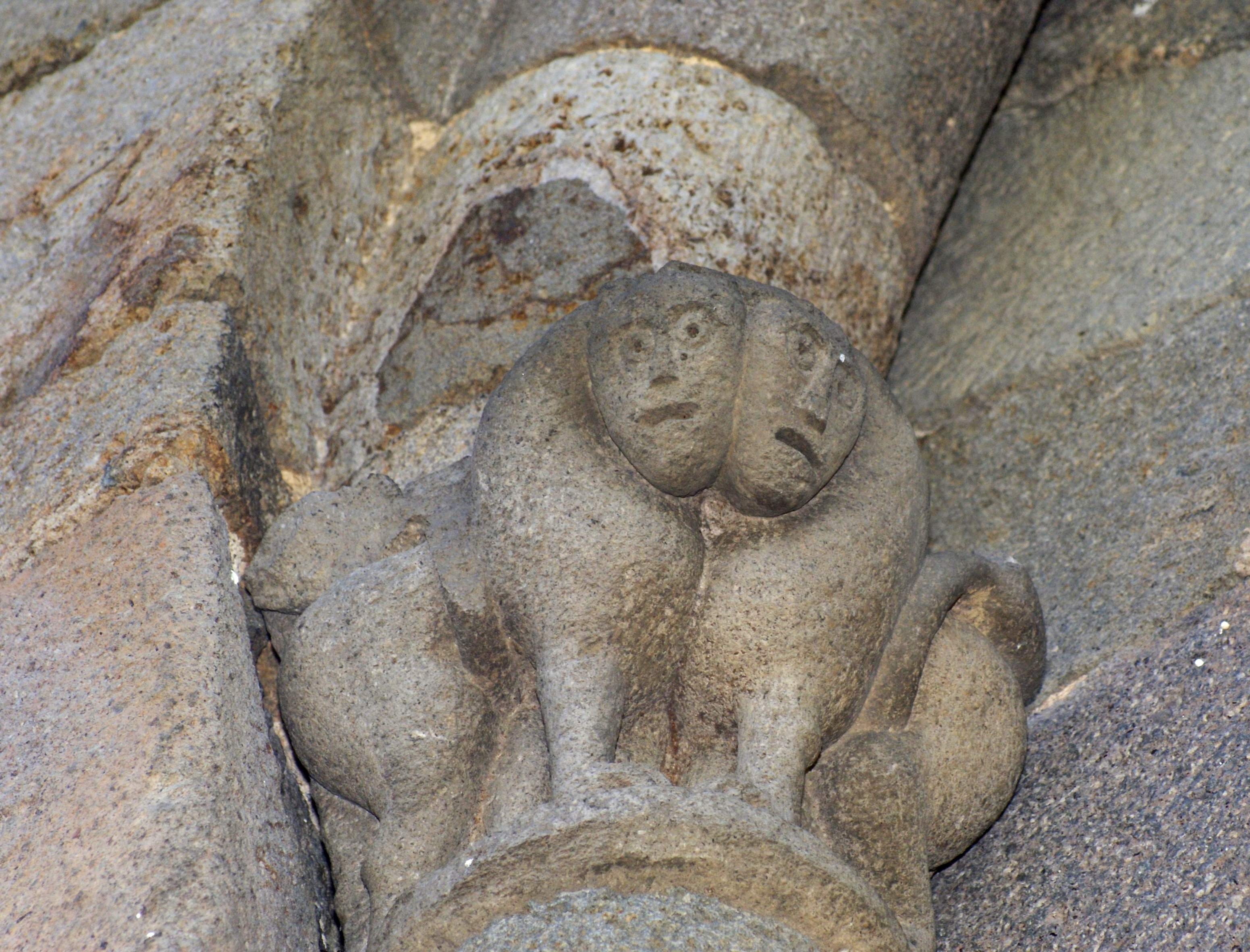 Eglise Saint-Thibaud (chapiteau)